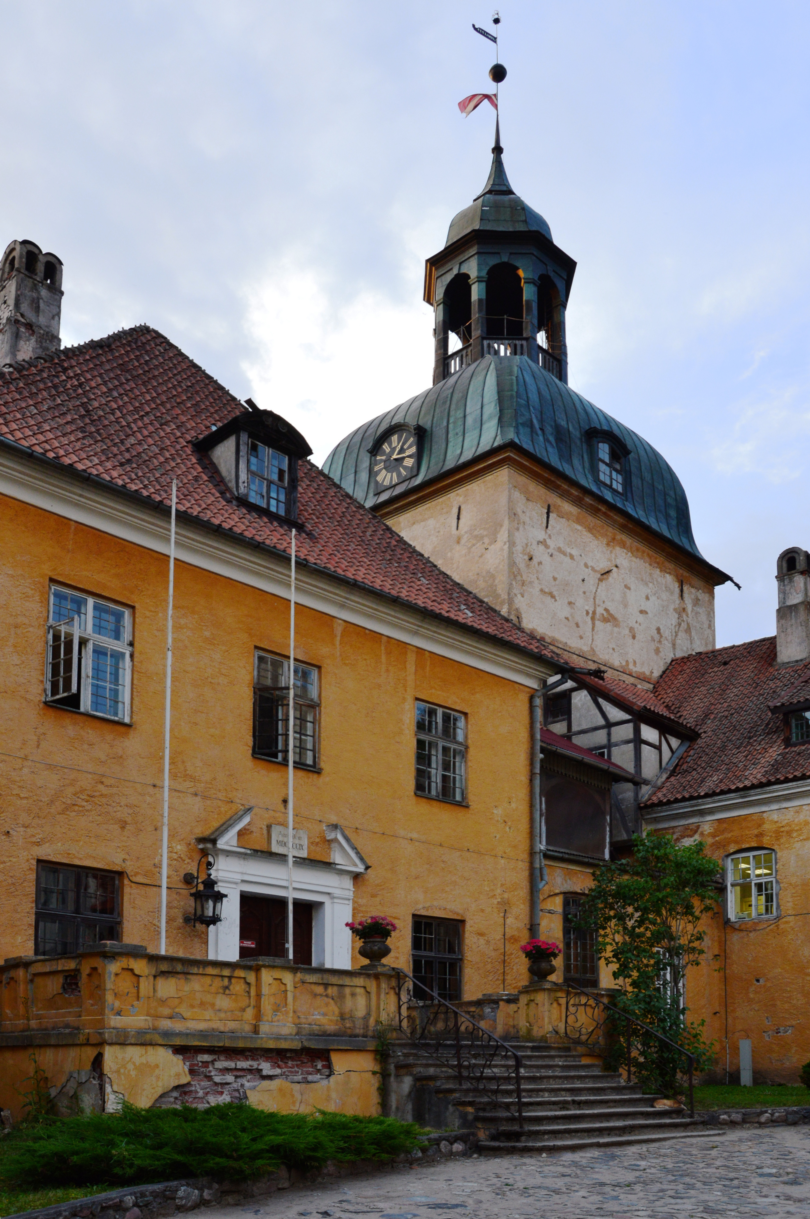 Lielstraupe loss